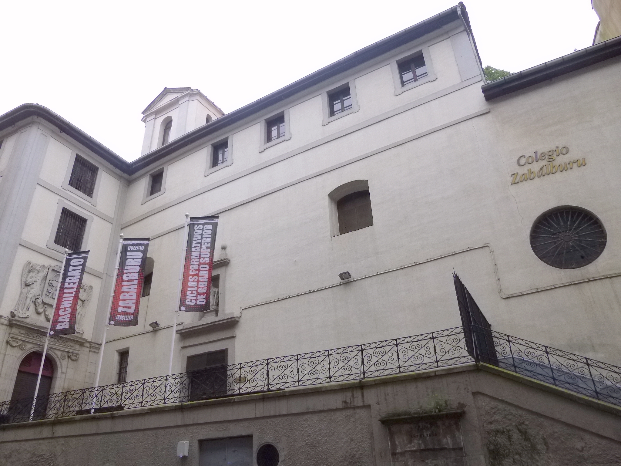 Colegio Zabalburu (antiguo Convento de la Esperanza), en Bilbao